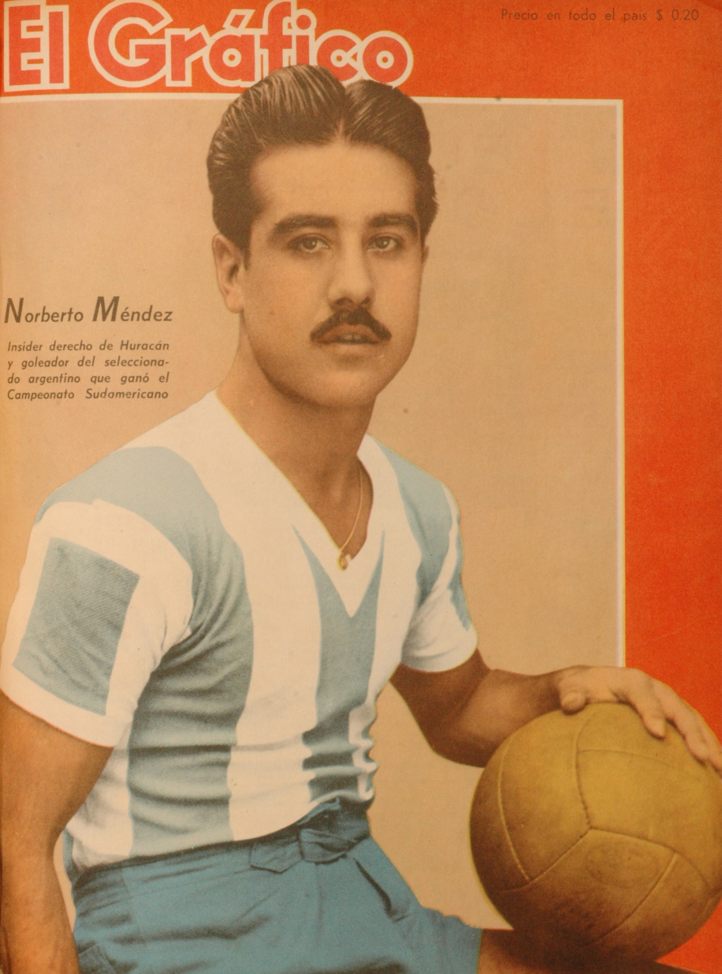 El Grafico del 30 de Marzo de 1945. Edicion 1342